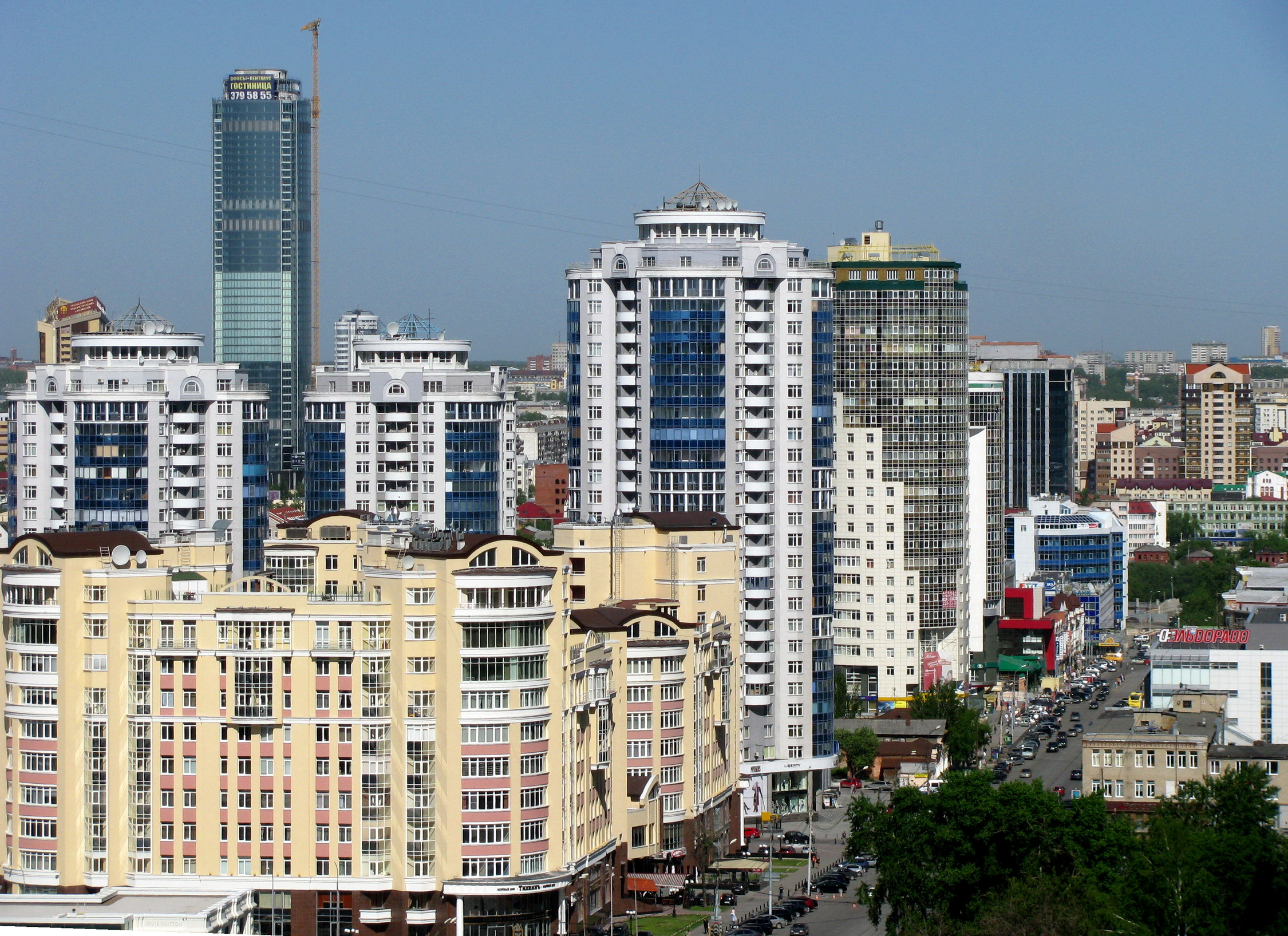 Екатеринбург